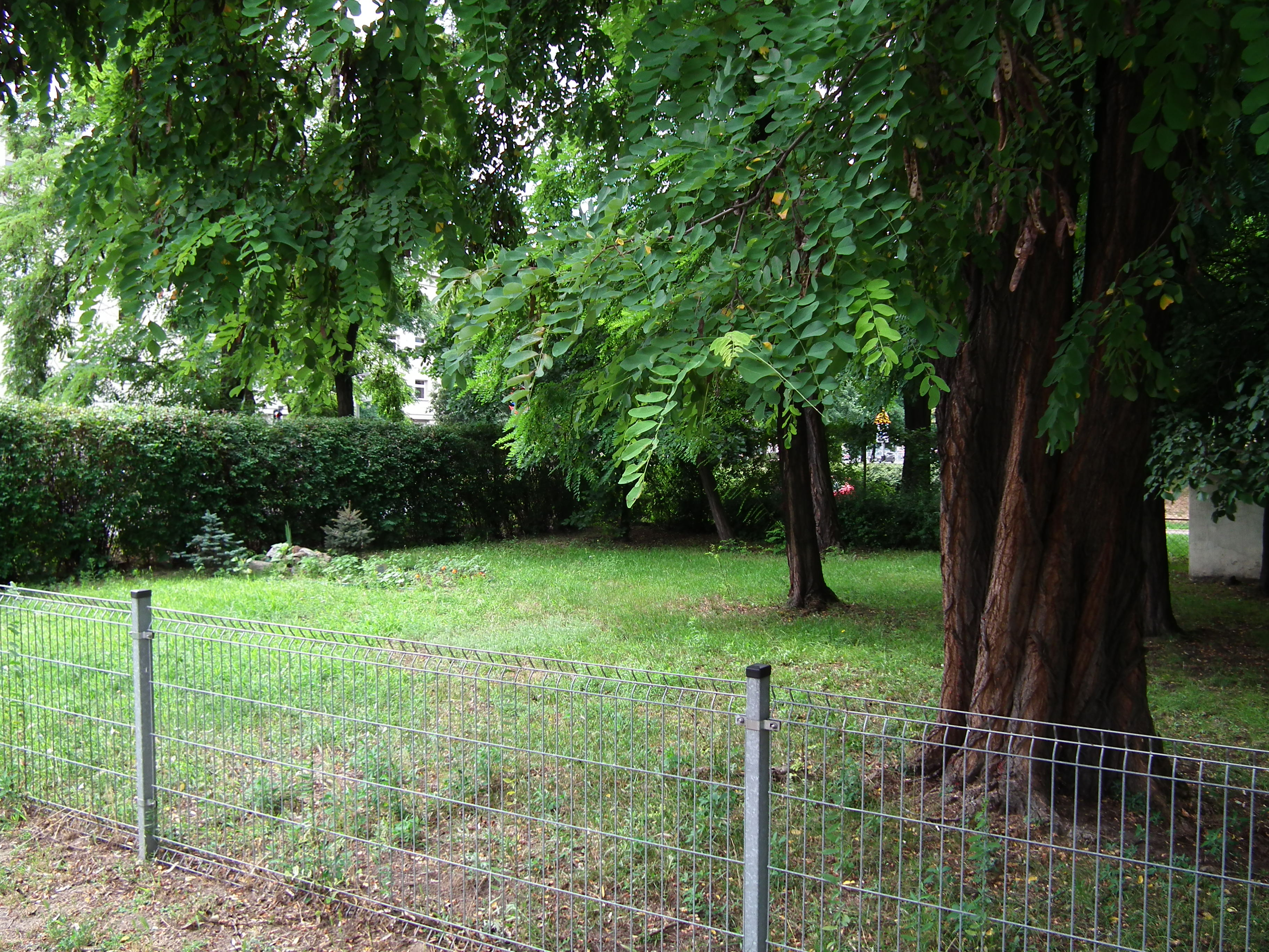 Solna/Marcinkowskiego. Miejsce po pomniku Wilhelma I w Poznaniu.